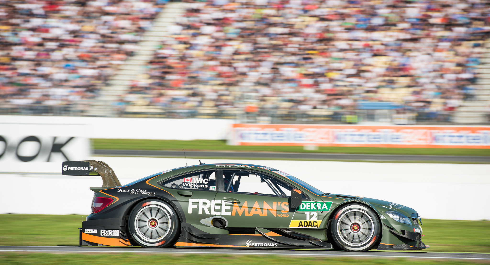 DTM,Deutsche Tourenwagen Masters,FREE MAN'S WORLD Mercedes AMG C-Coupe,HWA AG,Hockenheimring,Motorsport,Robert Wickens